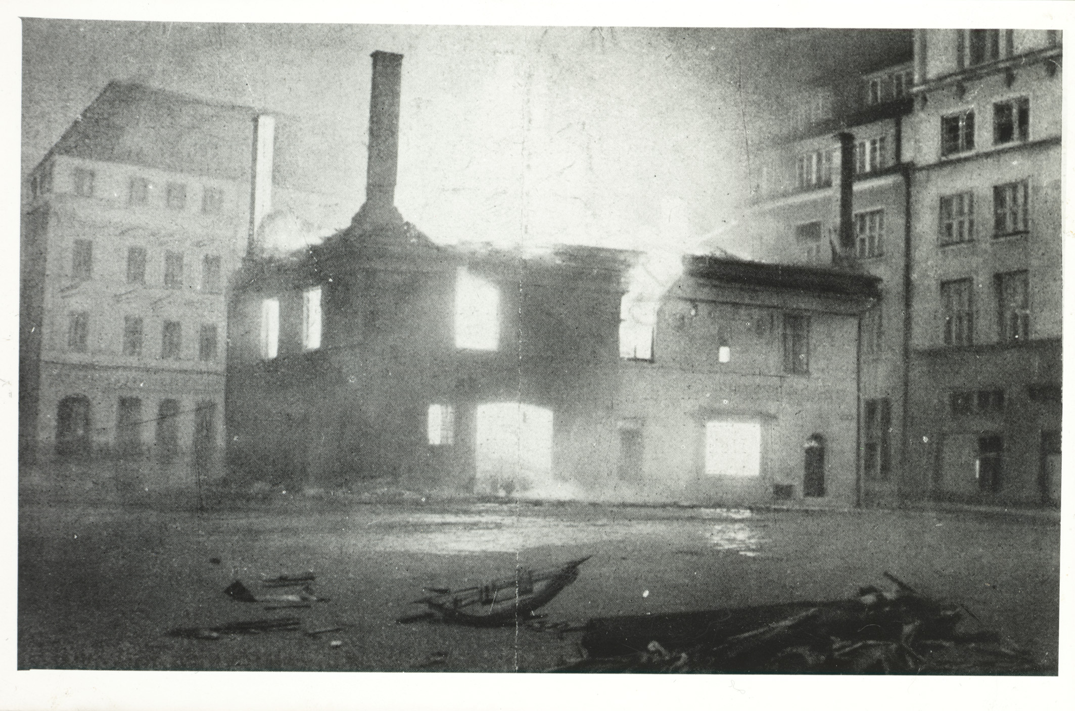 Põlev vaekoda